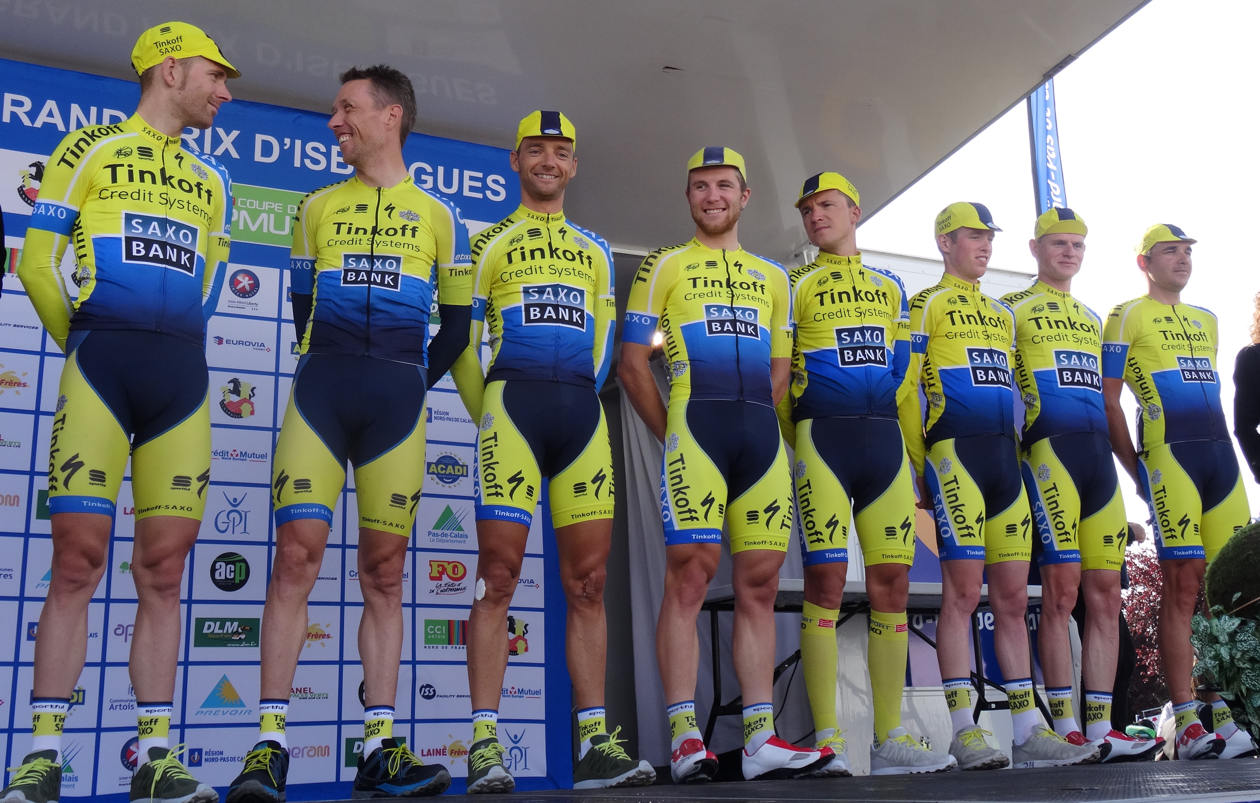 Reportage réalisé le dimanche 21 septembre à l'occasion du départ et de l'arrivée du Grand Prix d'Isbergues 2014 à Isbergues, Nord-Pas-de-Calais, France.